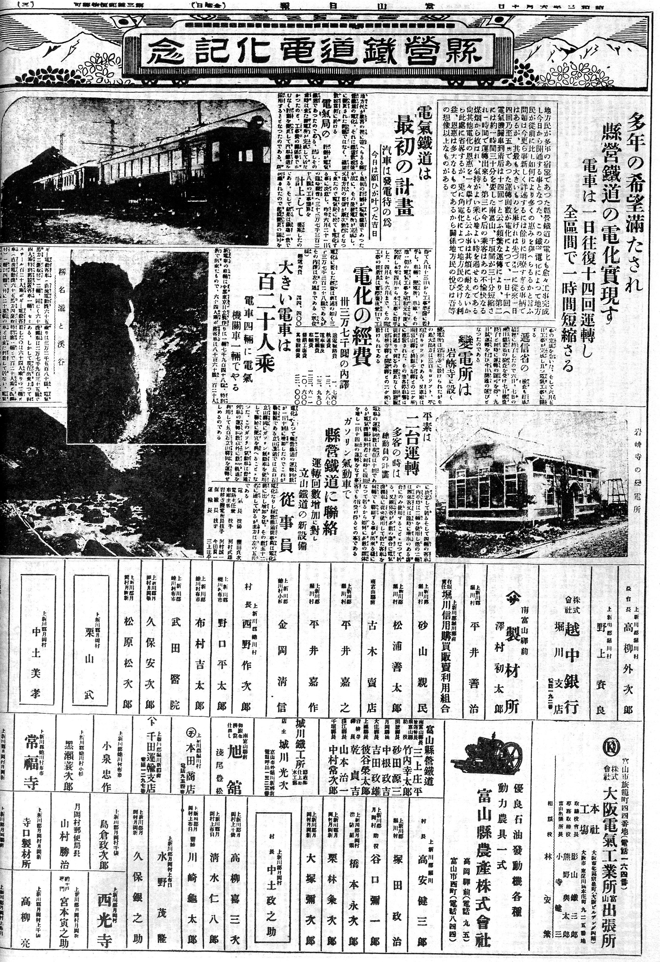 富山県営鉄道線が全線において電化した旨を報ずる新聞記事